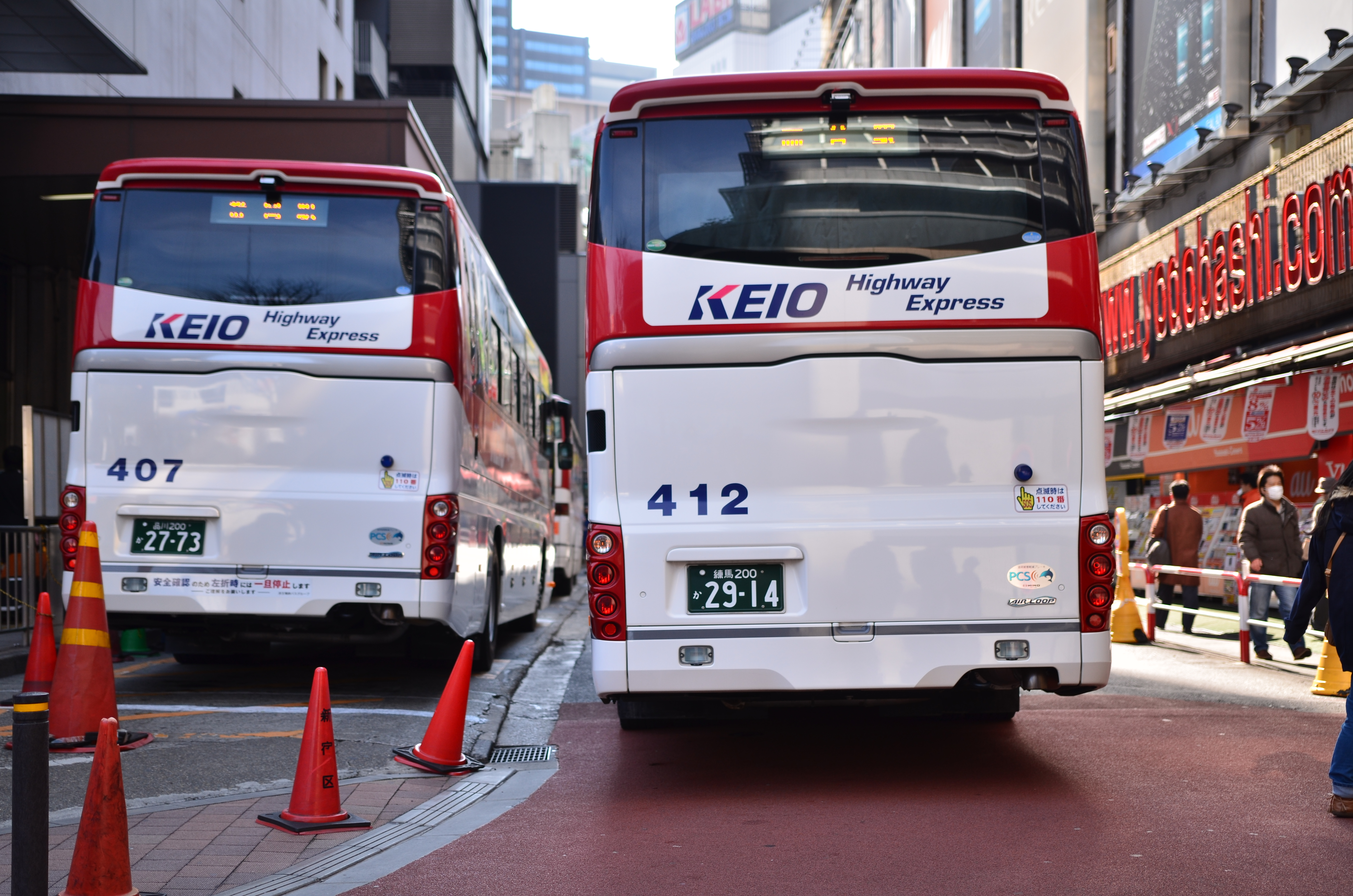 シスターズ